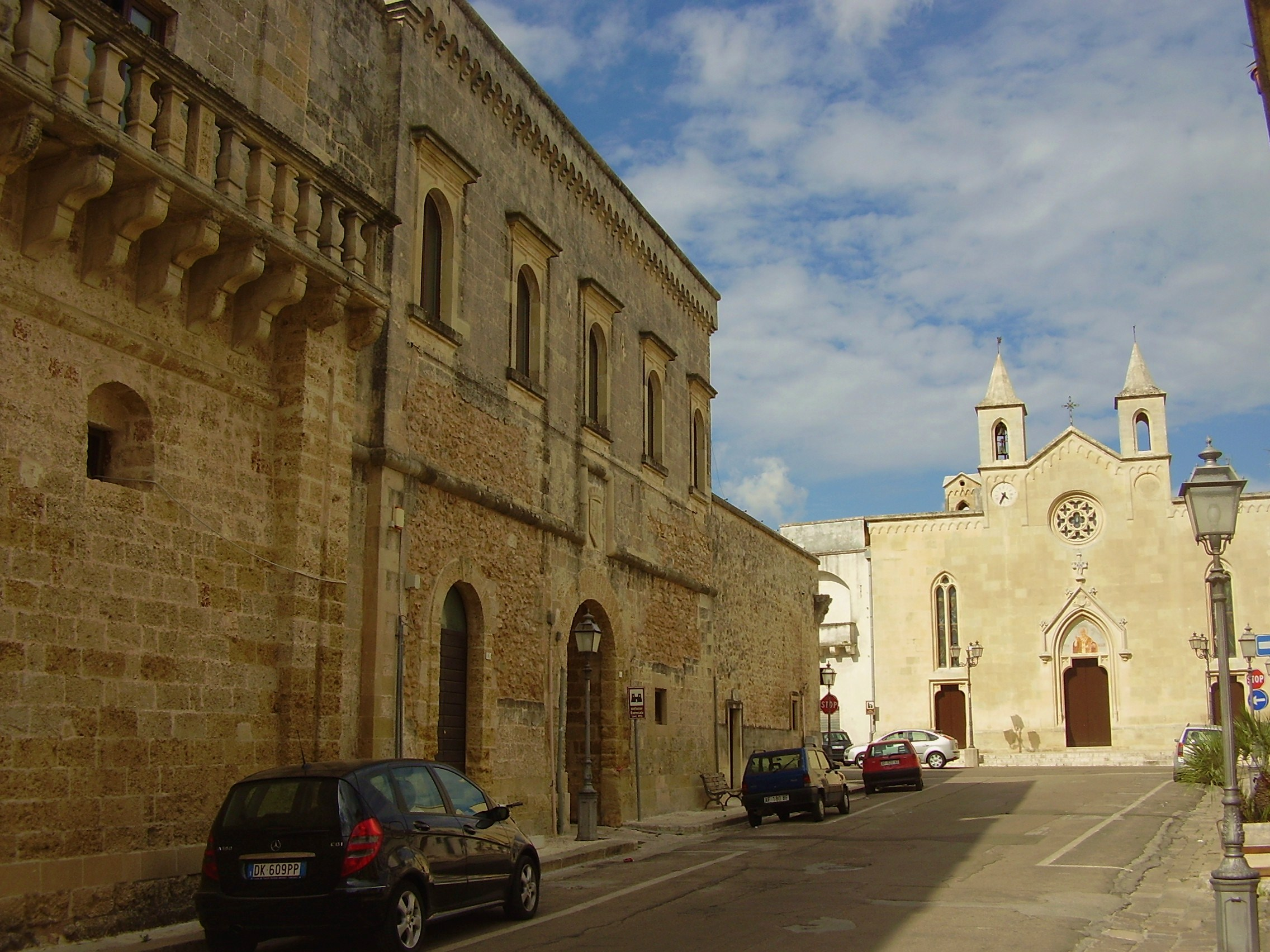 Piazza di Nociglia